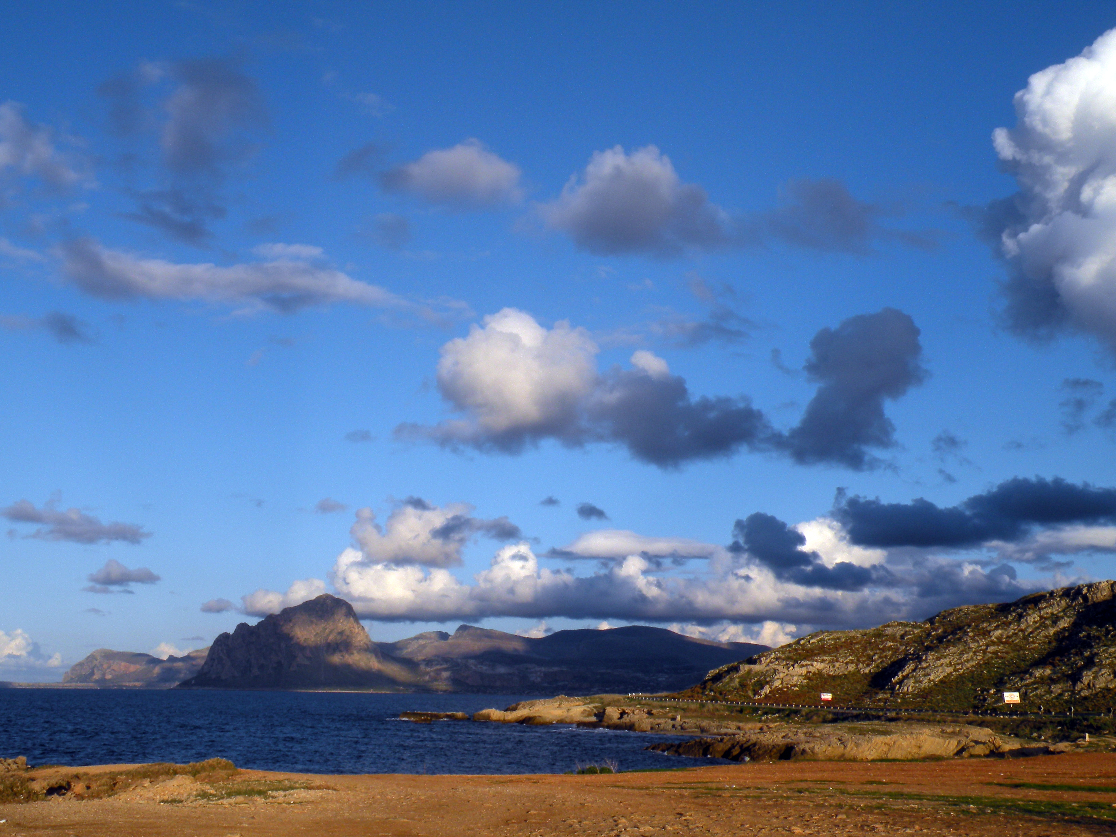 nono chilometro, monte cofano